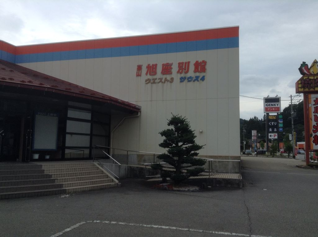 既に閉館した高山旭座（映画館）の別館の外観です。